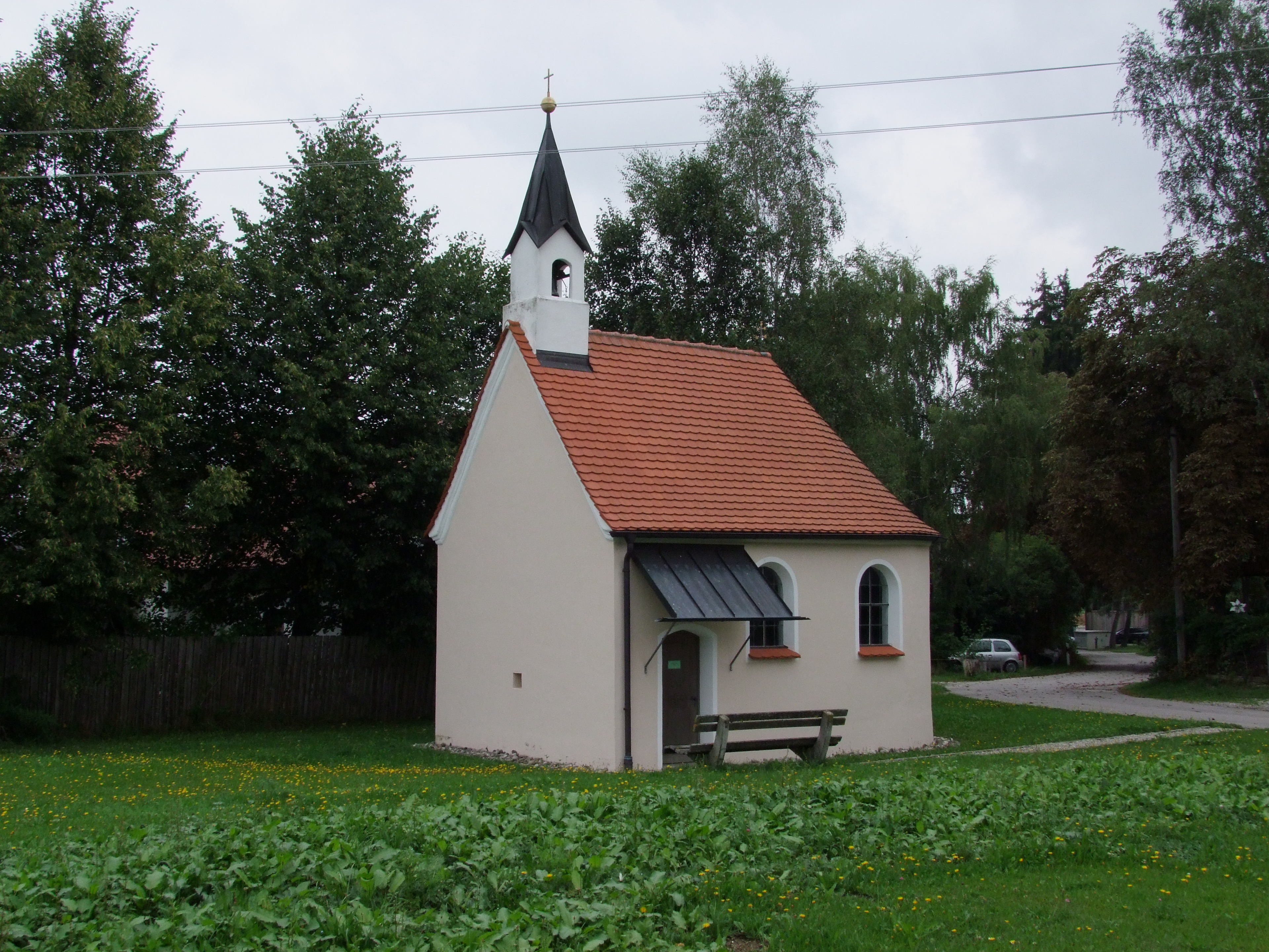 Die Kapelle zur Heiligen Kümmernis in Obergammenried, einem Ortsteil von Bad Wörishofen in Schwaben